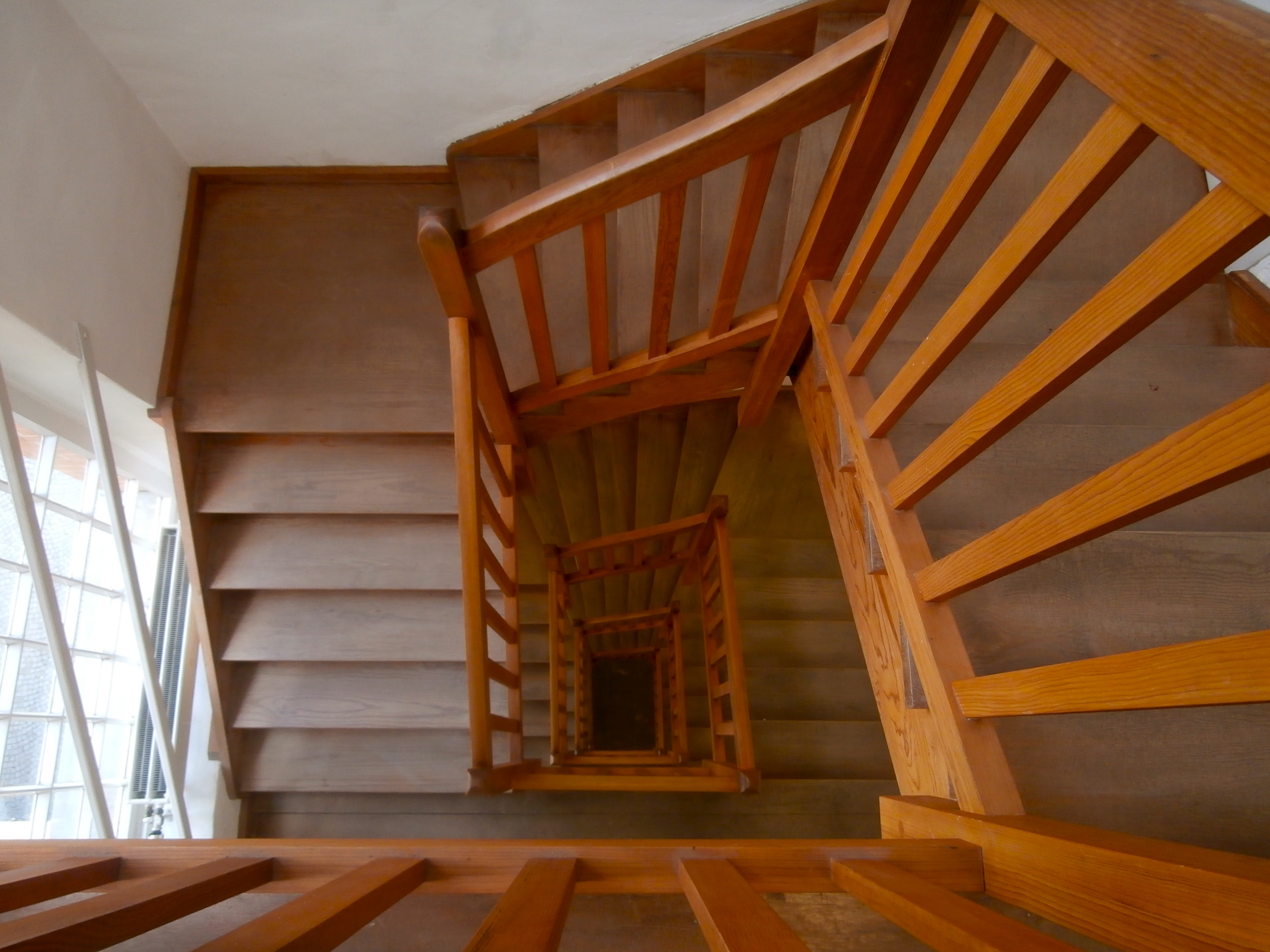 Treppenhaus im Fabrikgebäude Schloss Cromford, Ratingen